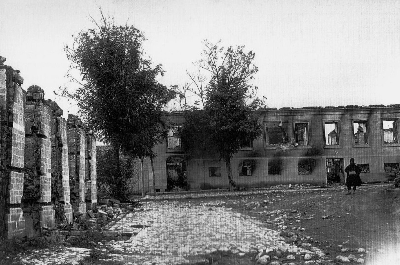 “İmamlı” bölgəsində İsgəndərovların evinin dağıntıları